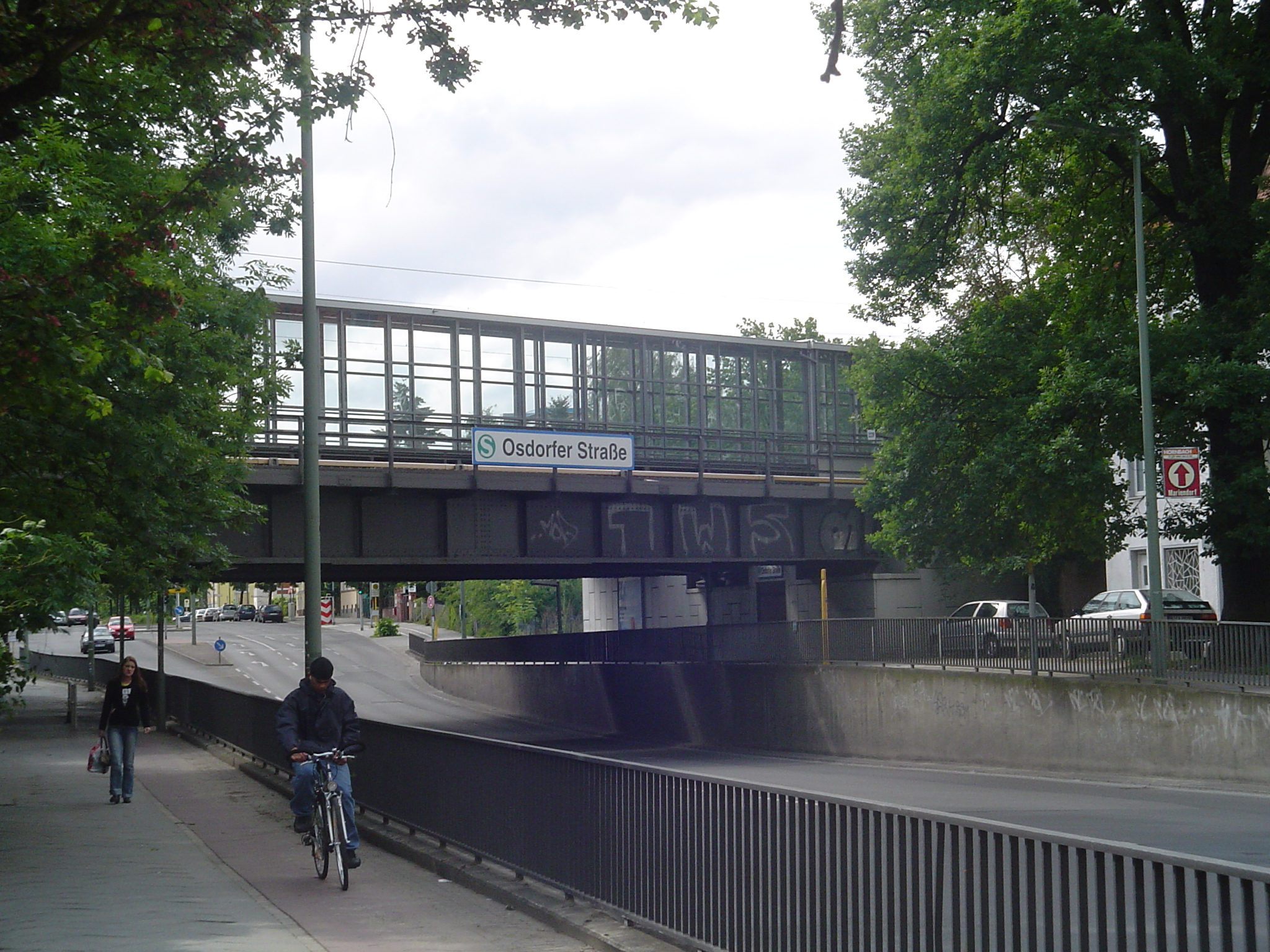 S-Bahnhof Osdorfer Straße, von Norden